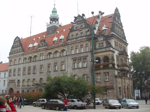 Nowy Ratusz w Legnicy